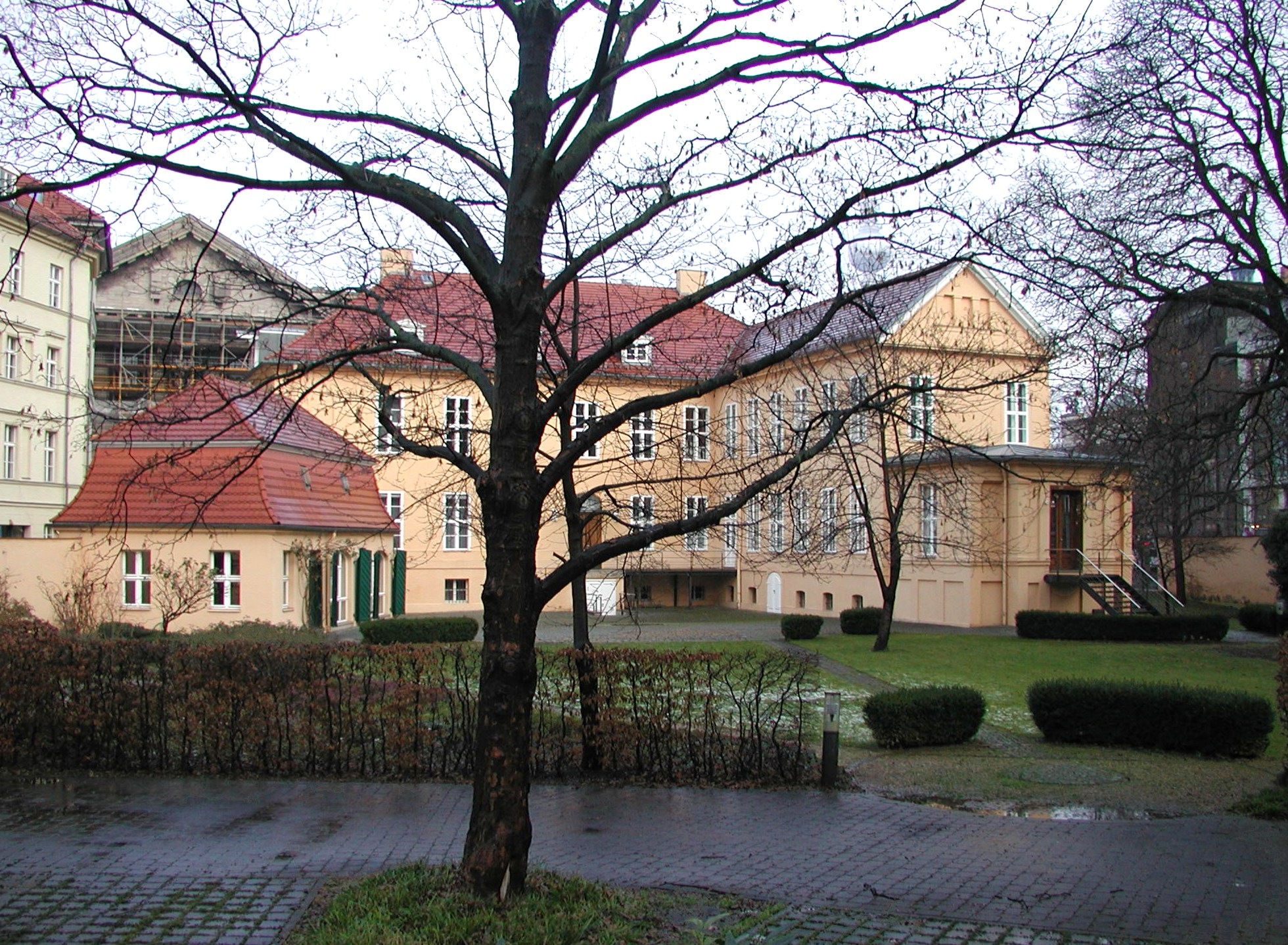 Gesamtansicht vom Magnushaus vom Hof/total view of Magnushaus from the gardensite